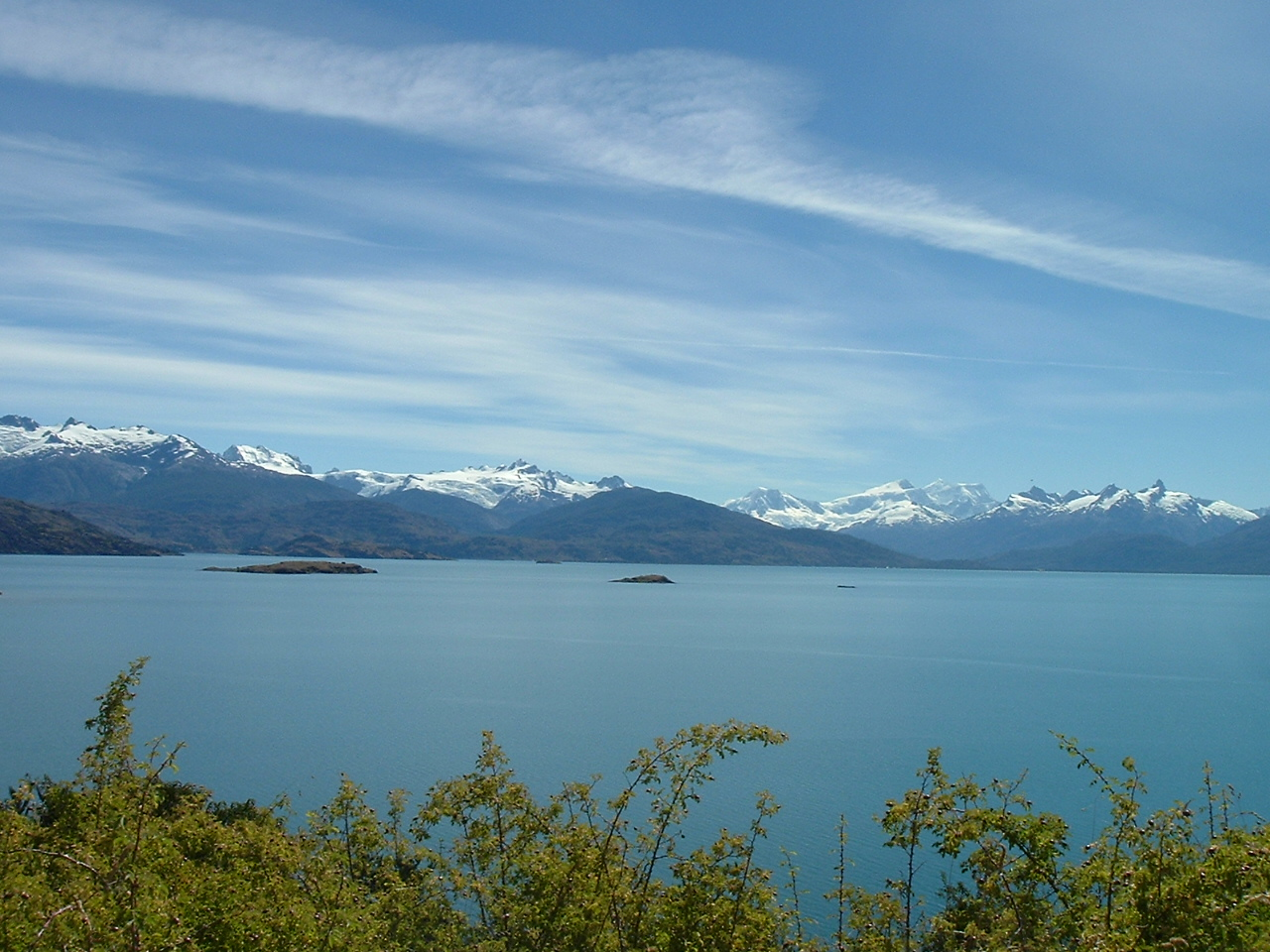 Vista desde la carretera del lago General Carrera, con los Campos de Hielo Norte al fondo. Chile.